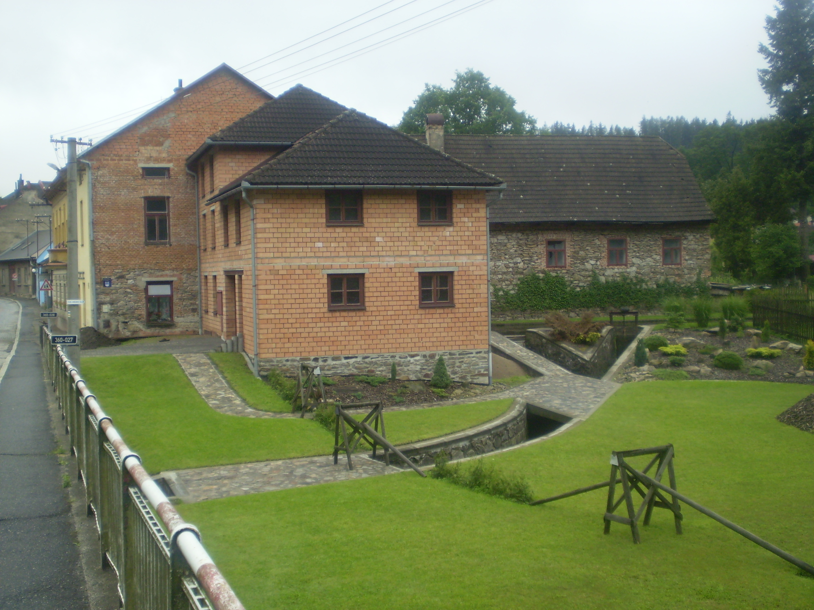 Zrekonstruovaný objekt bývalého Mostního mlýna (zv. též Dolní či Krausův), Mostní čp. 321.